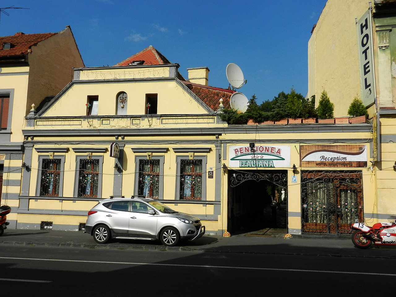 Casa monument istoric (Lunga 70)